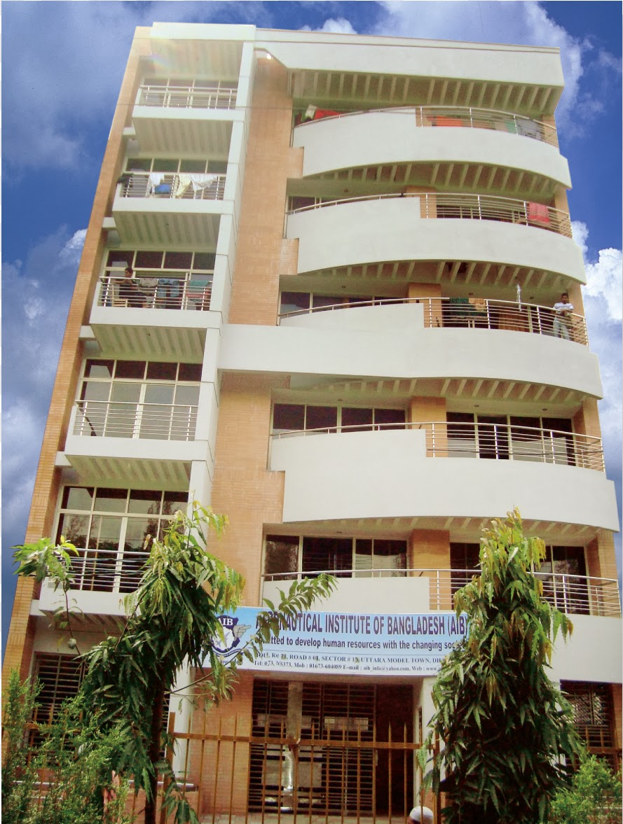 AIB Campus Image